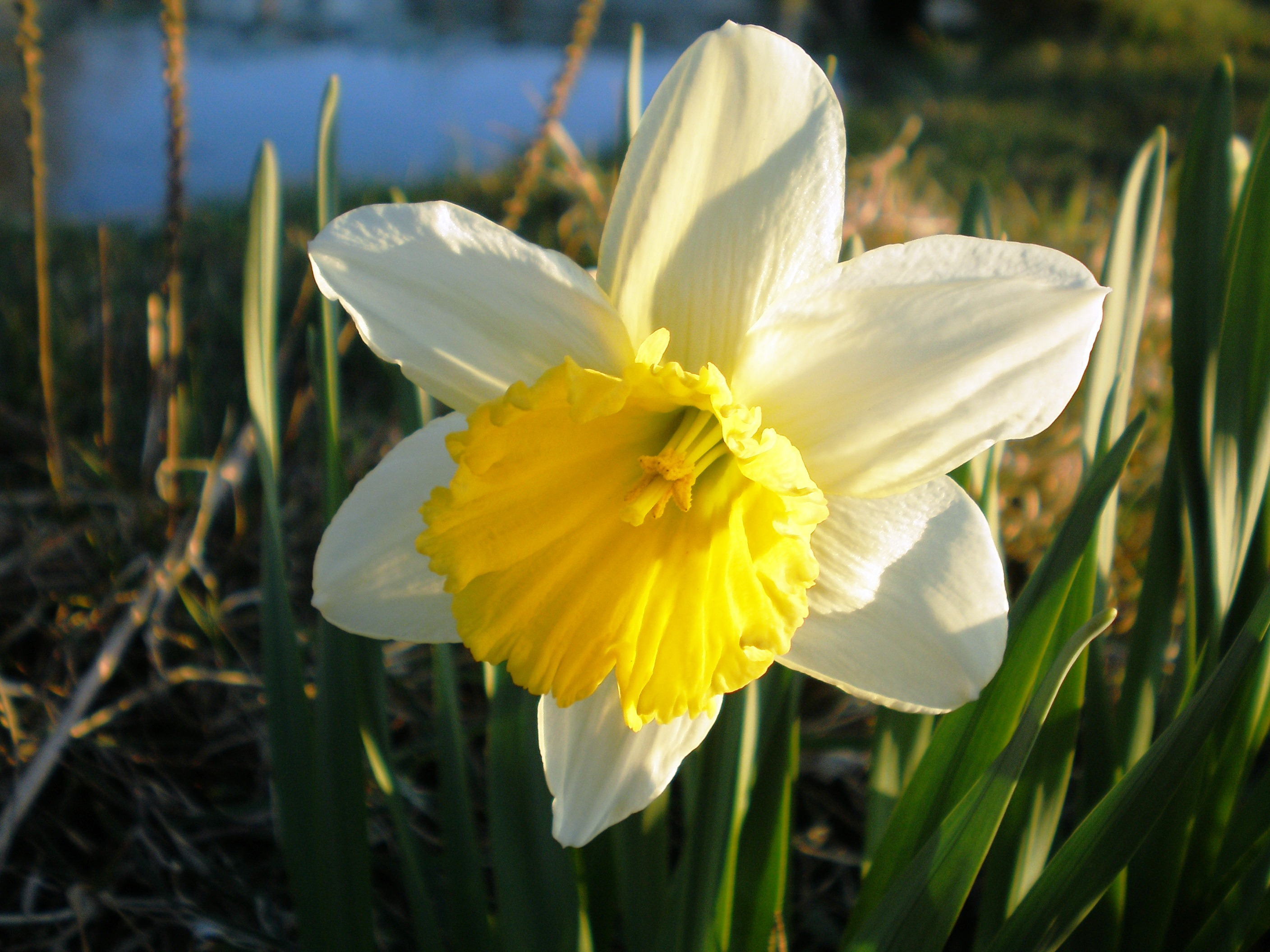 Narcizo žiedas Foto: Hugo.arg